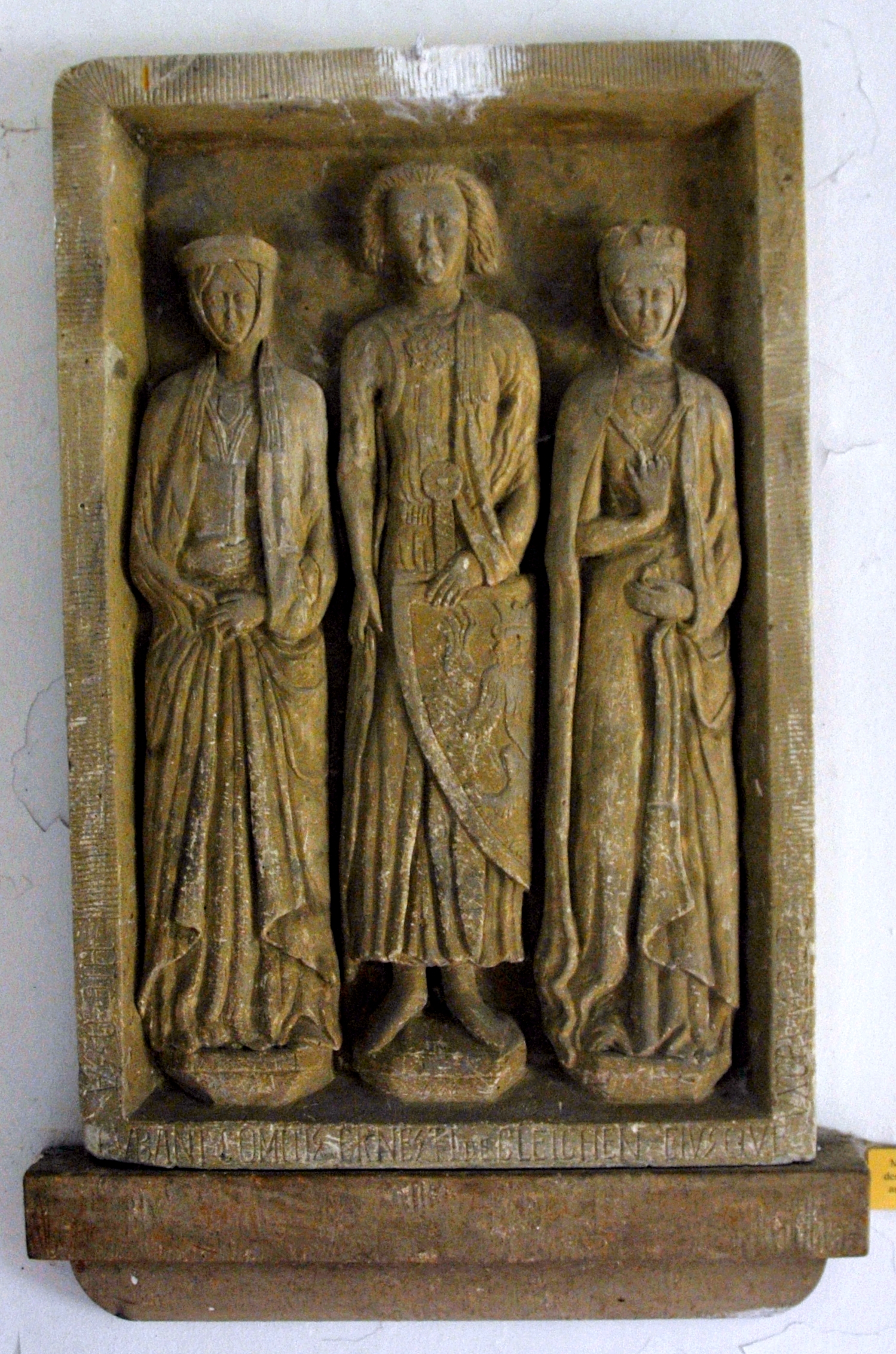 Burg Gleichen, Modell der Grabplatte des zweibeweibten Grafen (Original im Erfurter Dom)